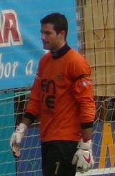 Bonis